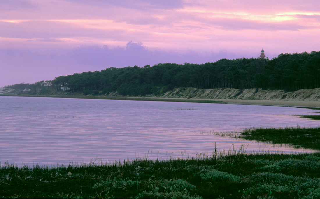 Baie de Bonne anse à marée haute après le coucher de soleil